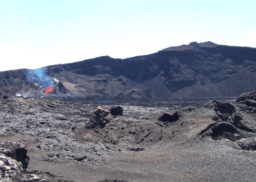 Piton de la Fournaise - eruption of october 2005 in crater Dolomieu photo : B.navez - 07 OCT 2005 - Réunion island